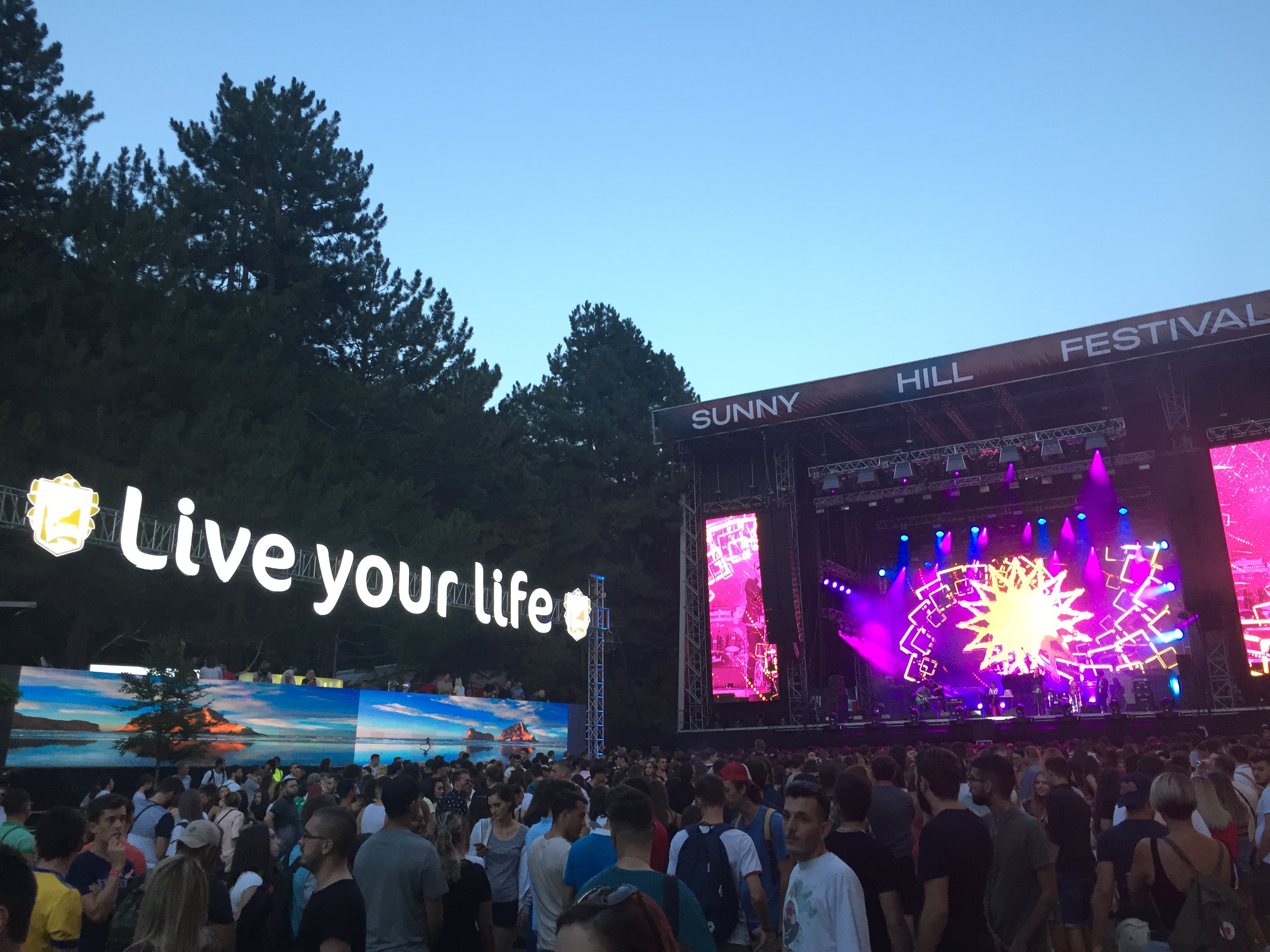 Bühne und VIP-Tribüne Sunny Hill Festival (10.8.2018), Pristina, Kosovo, Sponsor: Birra Peja